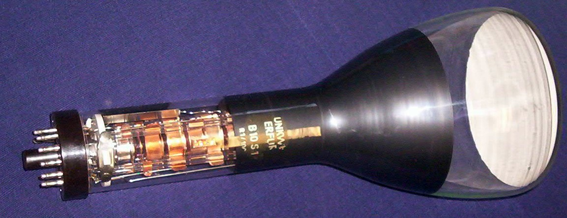 Osziröhre B 10 S 1 (VEB Funkwerk Erfurt, ca. 1960), Strahlsystem links, Leuchtschirm rechts, Ablenkplatten sind hinter der Graphitbeschichtung verborgen.